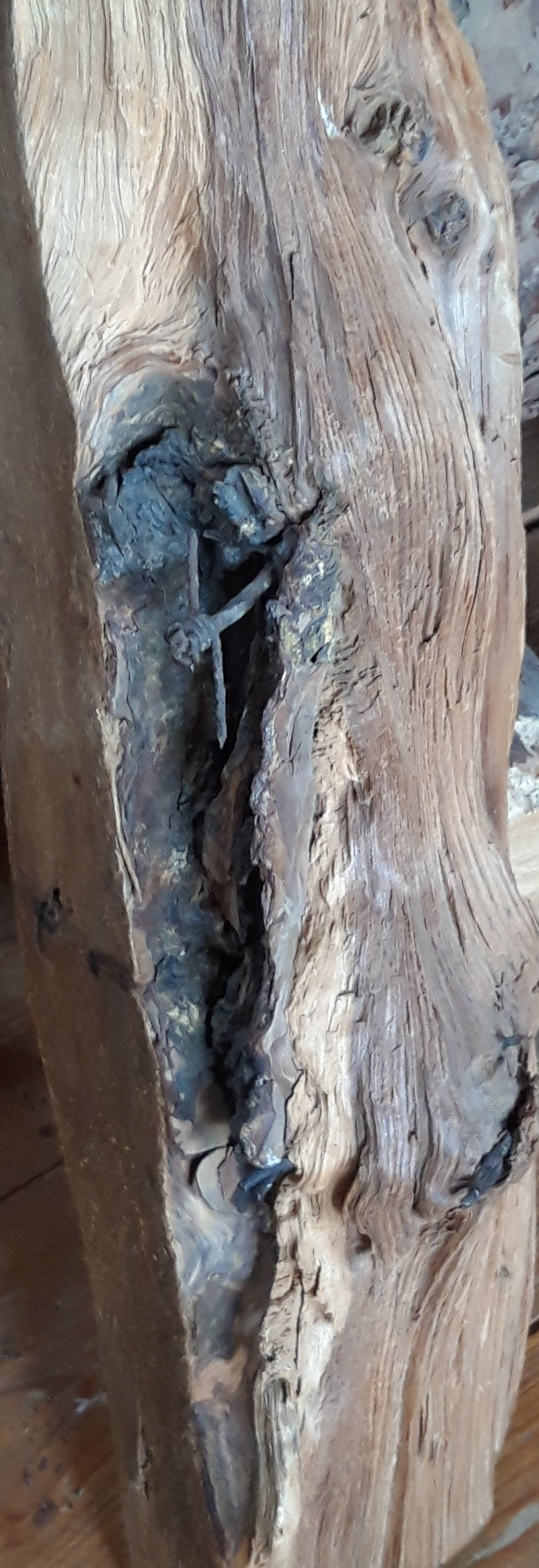 Pièce de bois vosgienne contenant des pièces métalliques datant de la Première Guerre mondiale, musée des métiers du bois, Labaroche (Haut-Rhin)